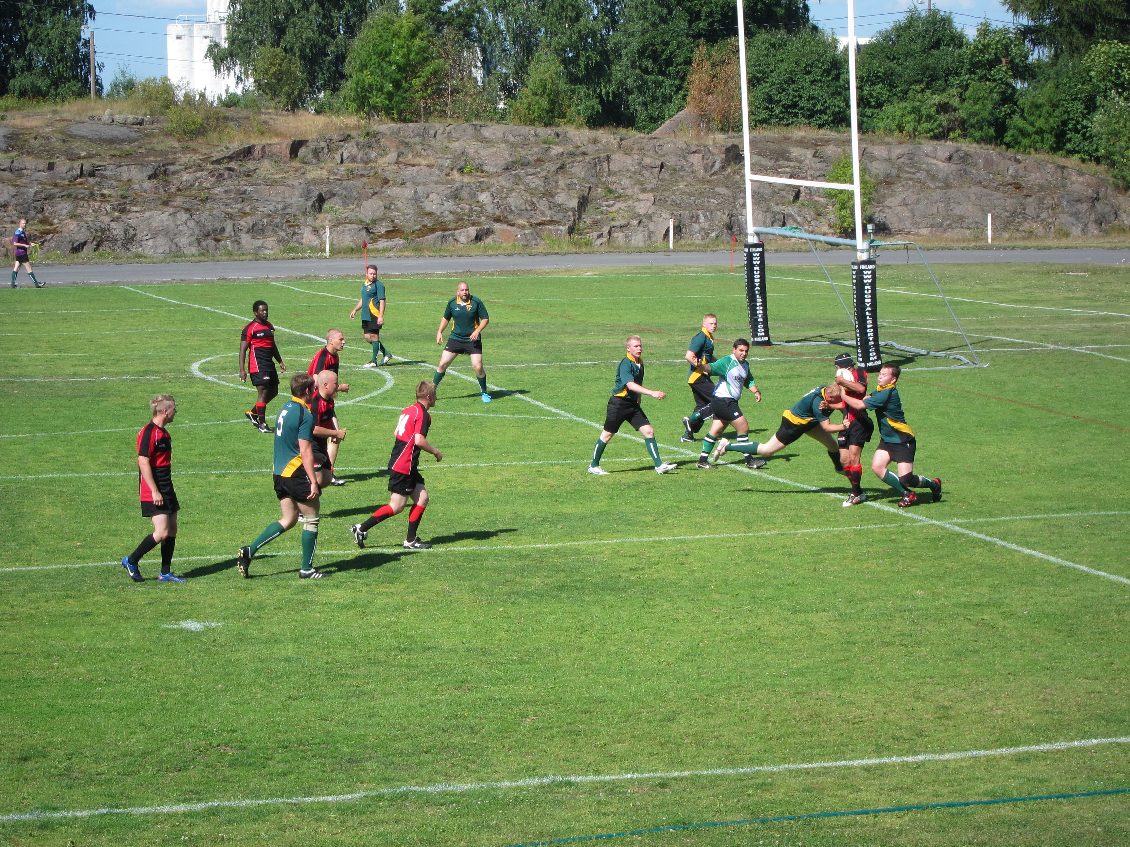 Kotkalainen rugby-union joukkue Griffins RFC (vihreä) pelaamassa rugby-7 -turnauksessa.